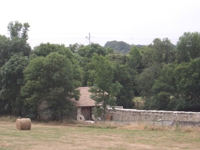 Molino en Goiuri-Ondona This is a photography of a Special Area of Conservation in Spain with the ID: ES2110003. Natura2000 entry, EEA entry